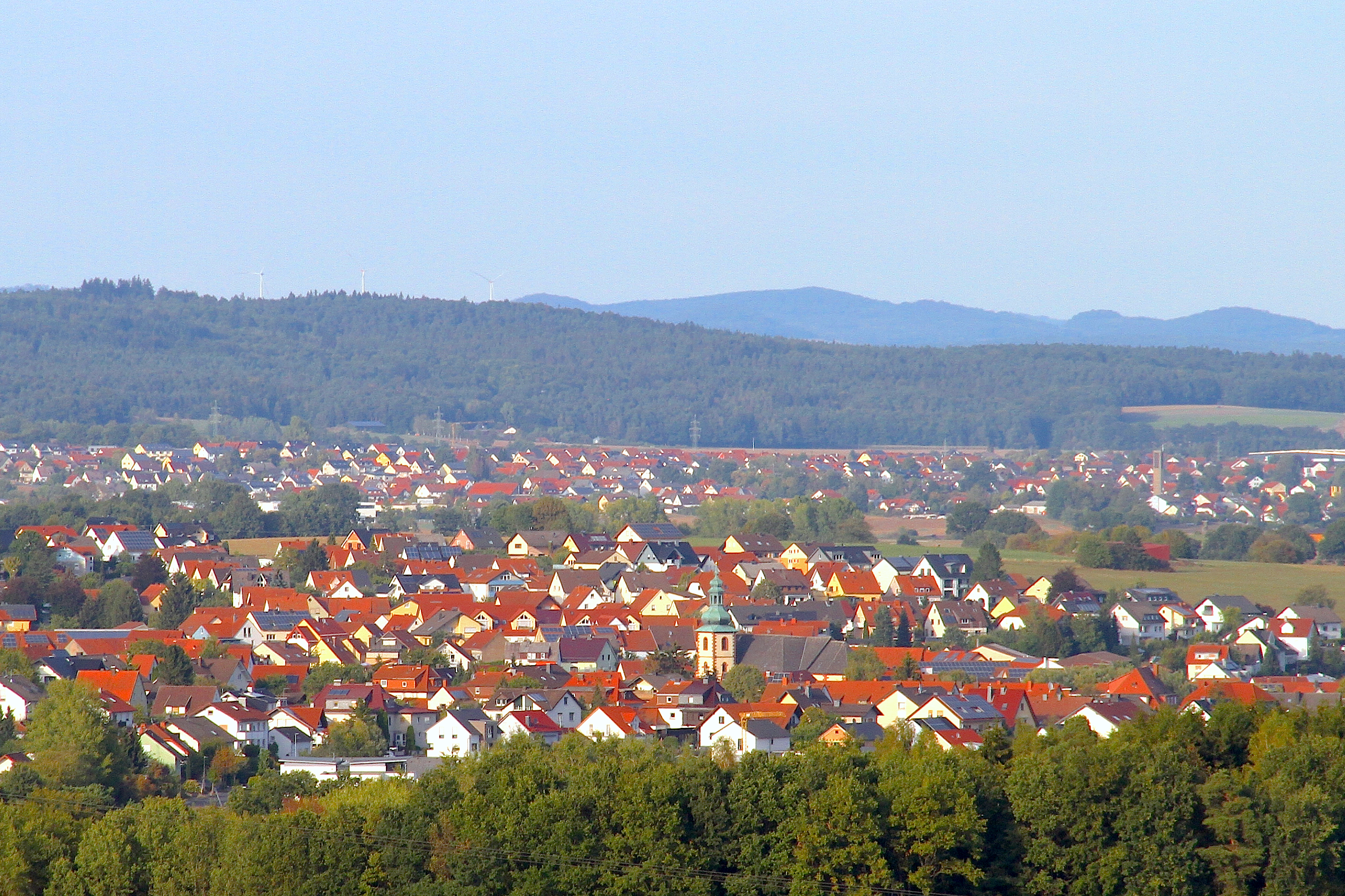 Ort Flieden in der Gem. Flieden (von Kautz aus gesehen), Neuhof-Ellers mit Gieseler Forst im Hintergrund